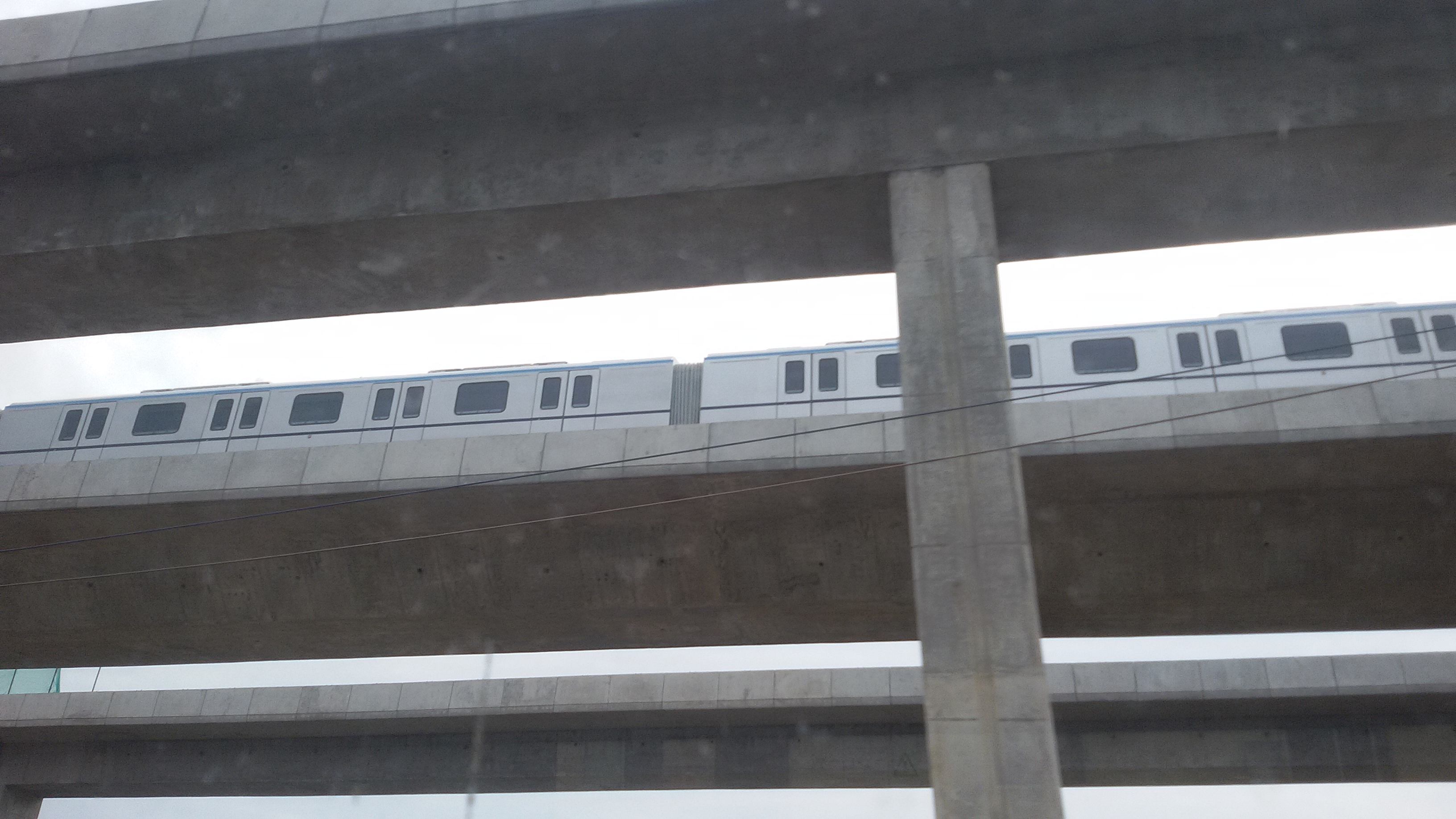 粵語: 2017年11月26號，新和站附近已經出現14號綫啲列車。